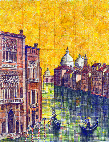 Ռիշար Ժերանյան, Վենետիկ